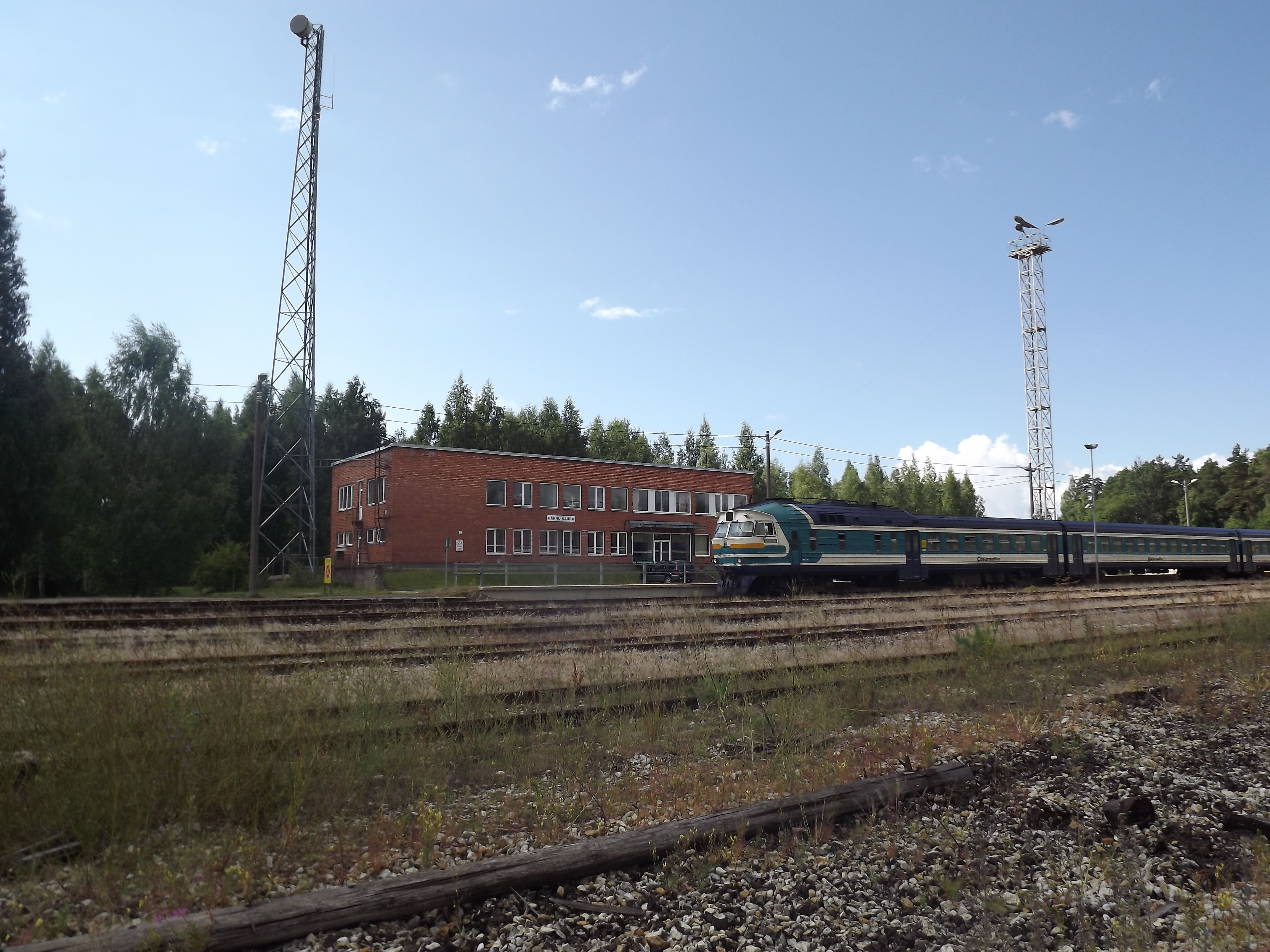 Pärnu kaubajaam